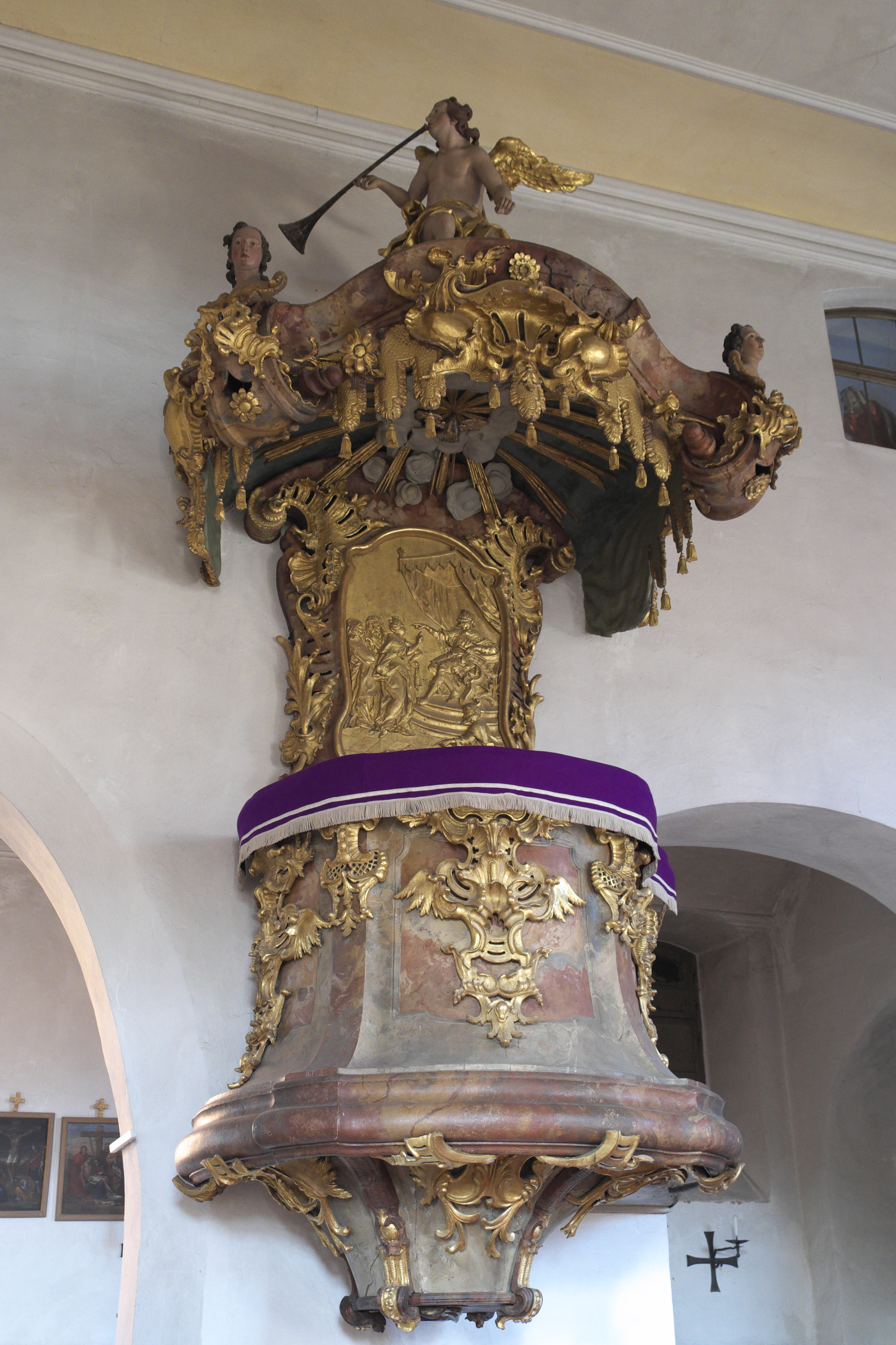 Katholische Pfarrkirche St. Petrus und Paulus in Halsbach, einem Ortsteil von Dürrwangen im Landkreis Ansbach (Mittelfranken/Bayern), Kanzel um 1745/46 mit Rocailleschnitzerei